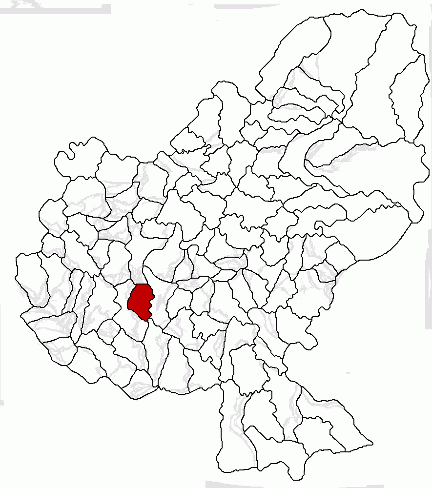 Categorie:Hărţi ale judeţului Mureş